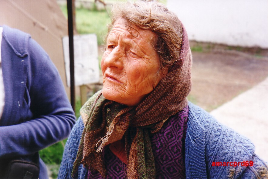 Old serb woman in Kosovo enclave near Peć, Kosovo 2000